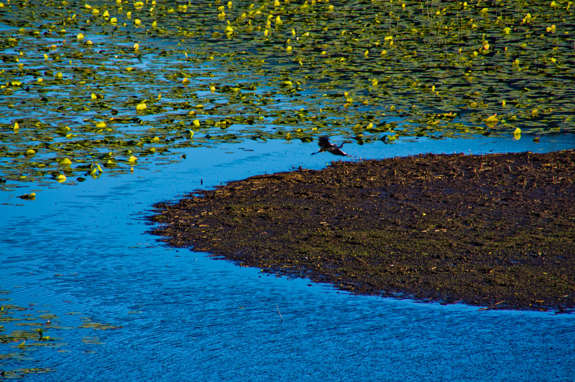 Έλος Καλοδικίου This is a photography of Natura 2000 protected area with ID GR2120002